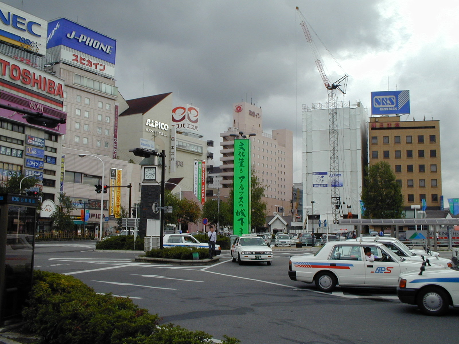 JR松本駅前(Matsumoto)